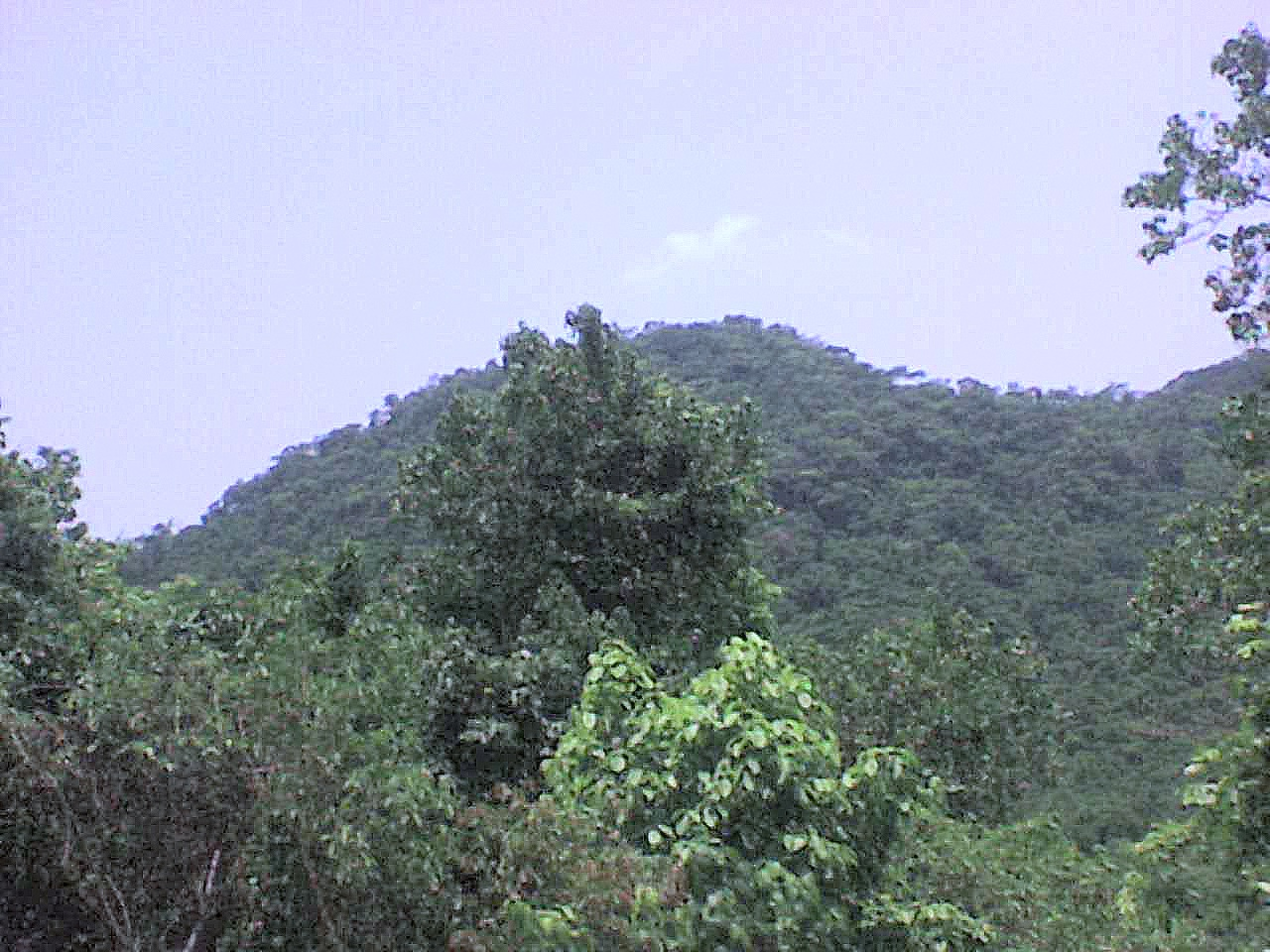 Imagen de la Sierra Mazateca, en SJB Tuxtepec, Oaxaca